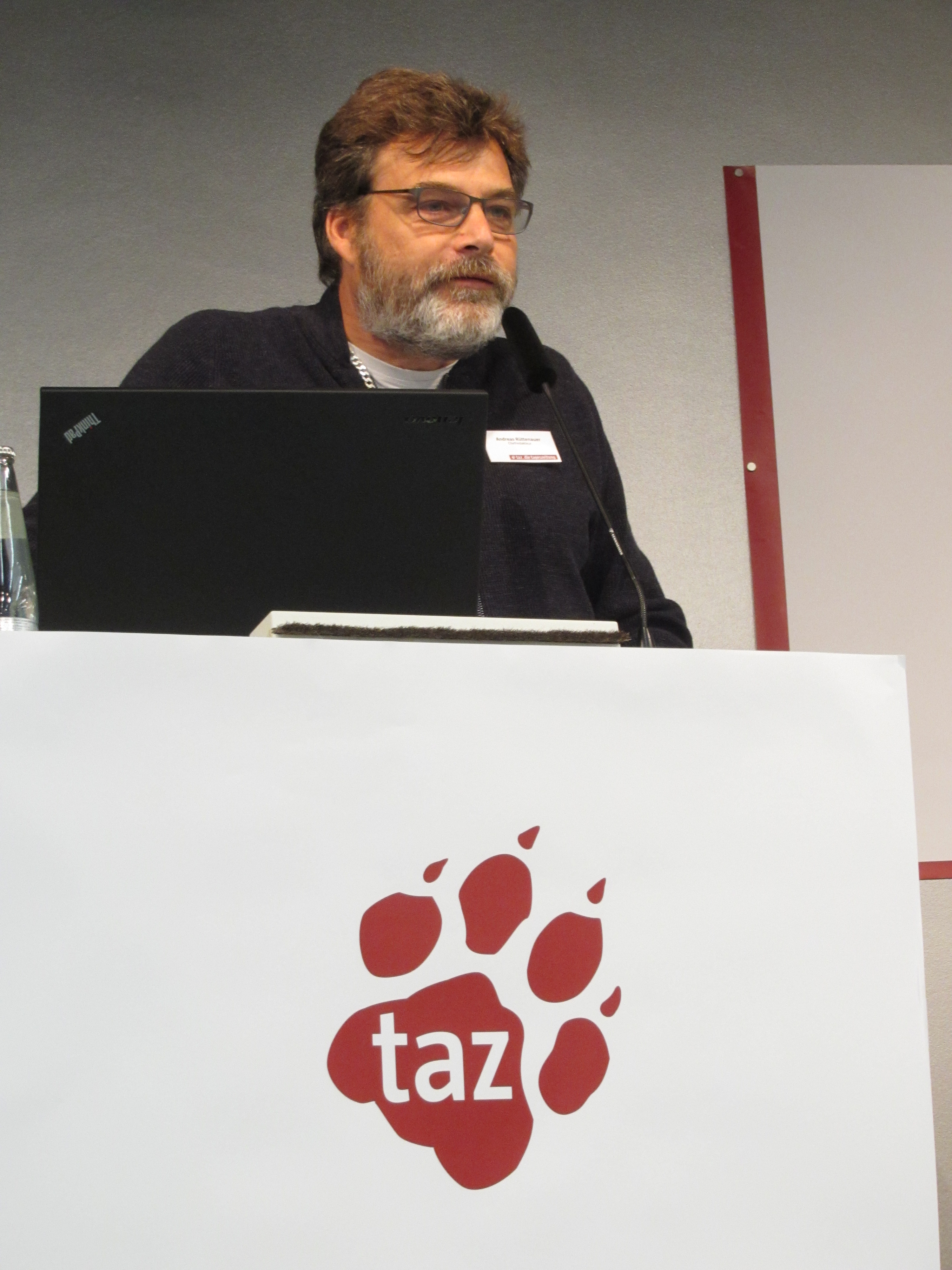 Andreas Rüttenauer (* 19. Januar 1968 in München) ist ein deutscher Journalist. Seit 2014 ist er gemeinsam mit Ines Pohl Chefredakteur der taz. Am 13. September 2014 in Berlin während der ordentlichen taz-Generalversammlung.